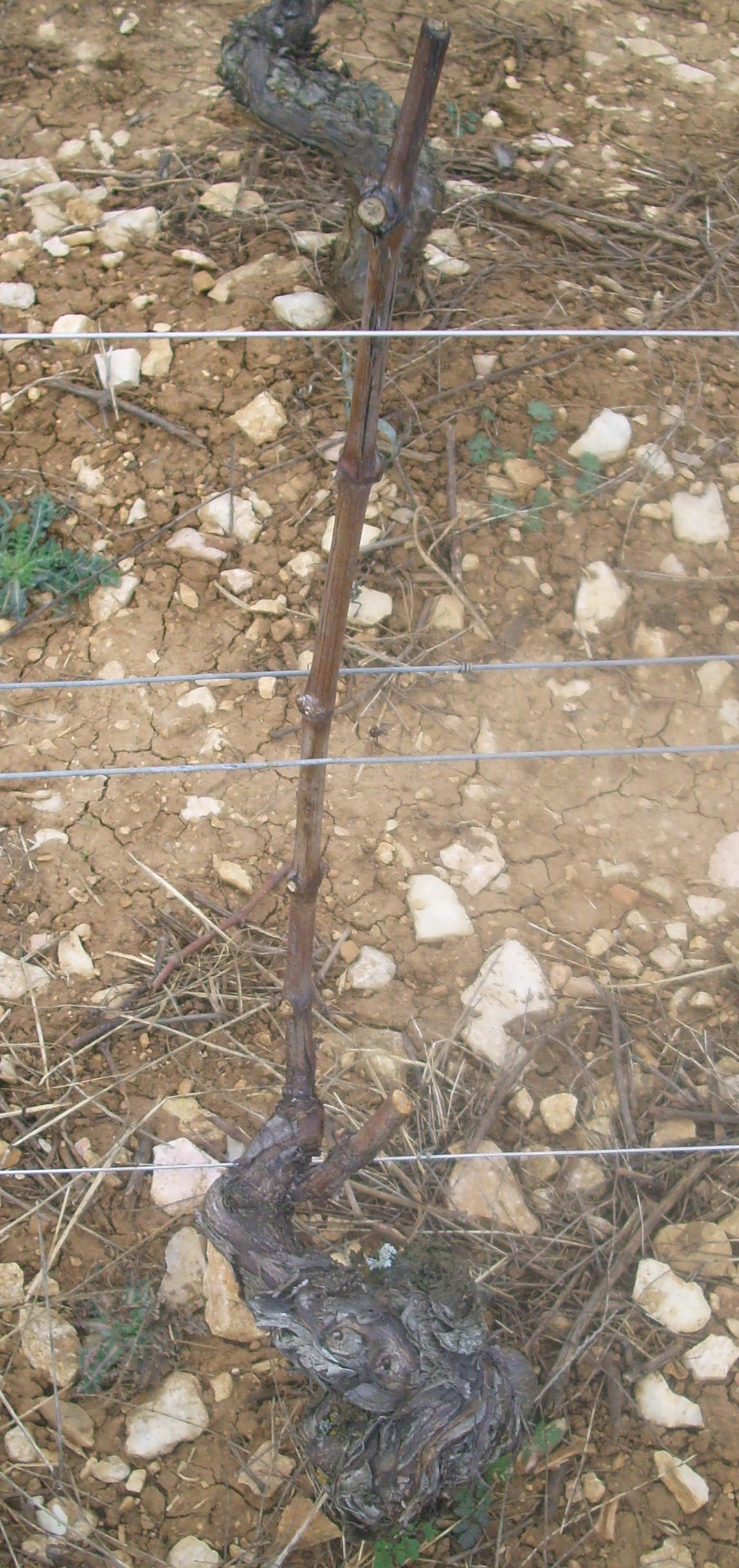 Pied de vigne taillé en Guyot simple à Rully (71)